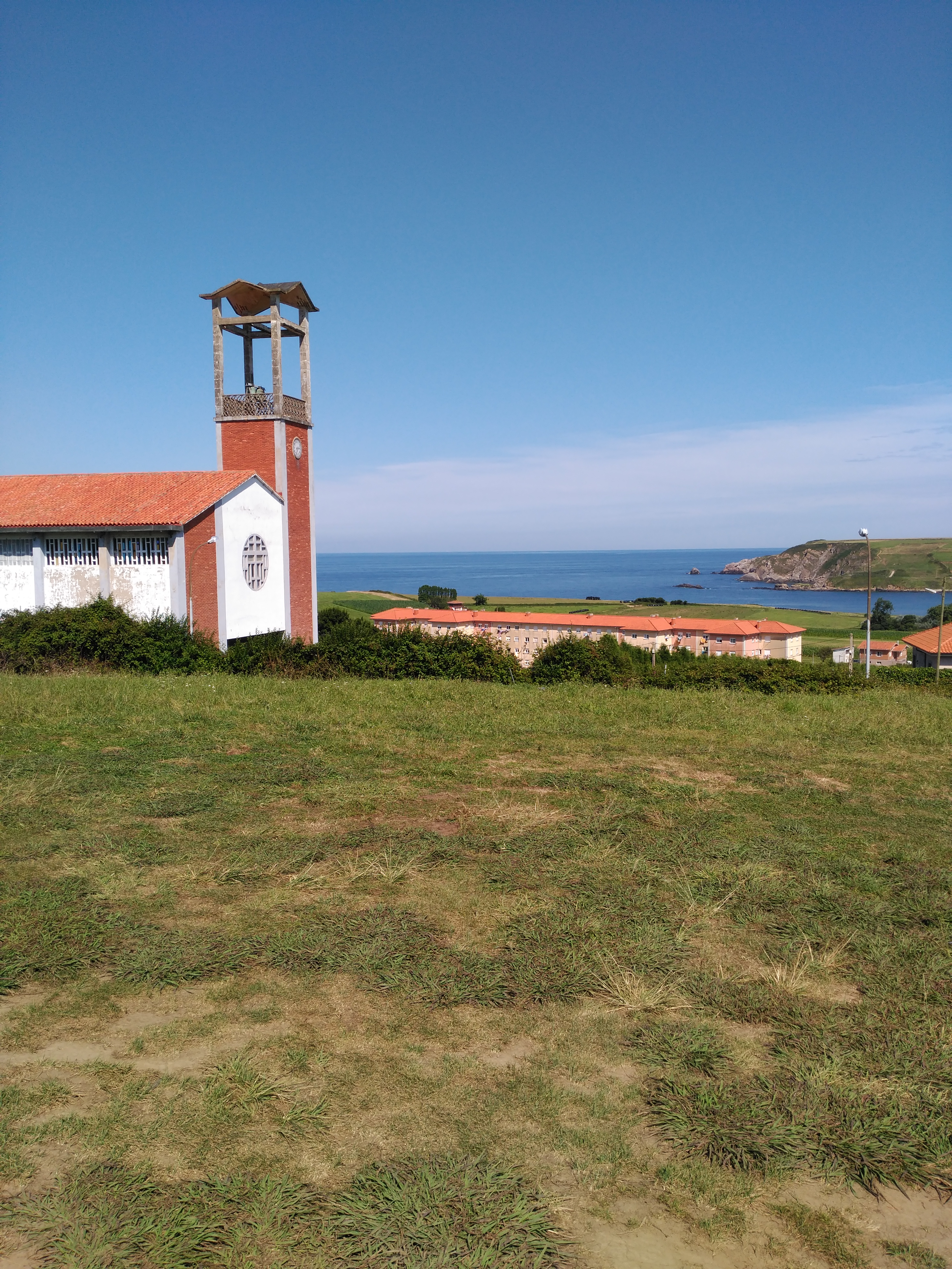 Iglesia de San Nicolás en la parroquia de Bañugues (municipio asturiano de Gozón, España)